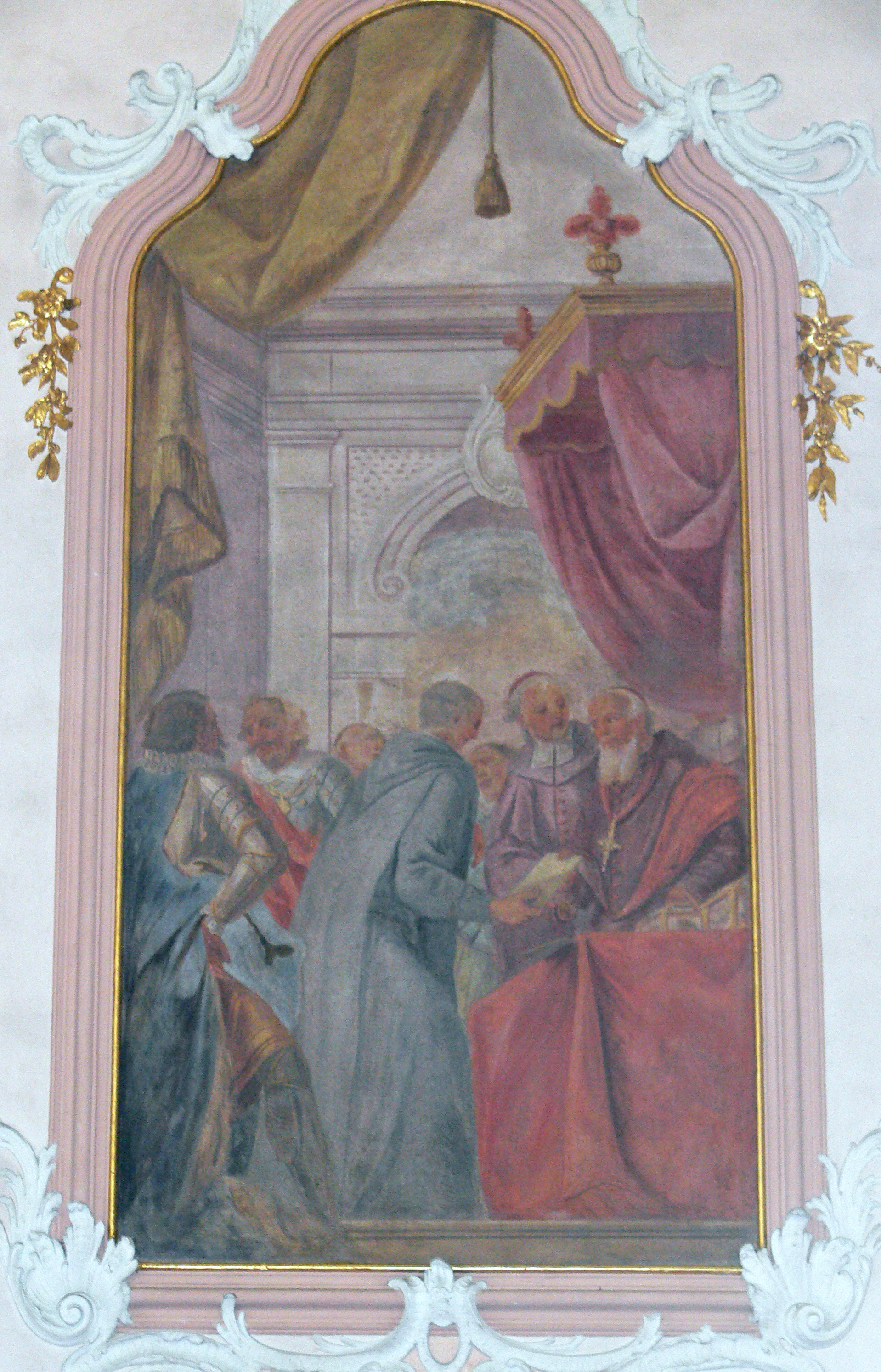 Pfarrkirche St. Ulrich, St. Ulrich im Schwarzwald, Gemeinde Bollschweil Szenen aus dem Leben des hl. Ulrich von Zell, 1767. Gemälde F: "Der hl. Ulrich empfängt vom Bischof von Basel den Tauschbrief für Zell gegen Gelände in Ambringen und Biengen vor den Zeugen Herzog Berthold II. von Zähringen und Markgraf Hermann II."